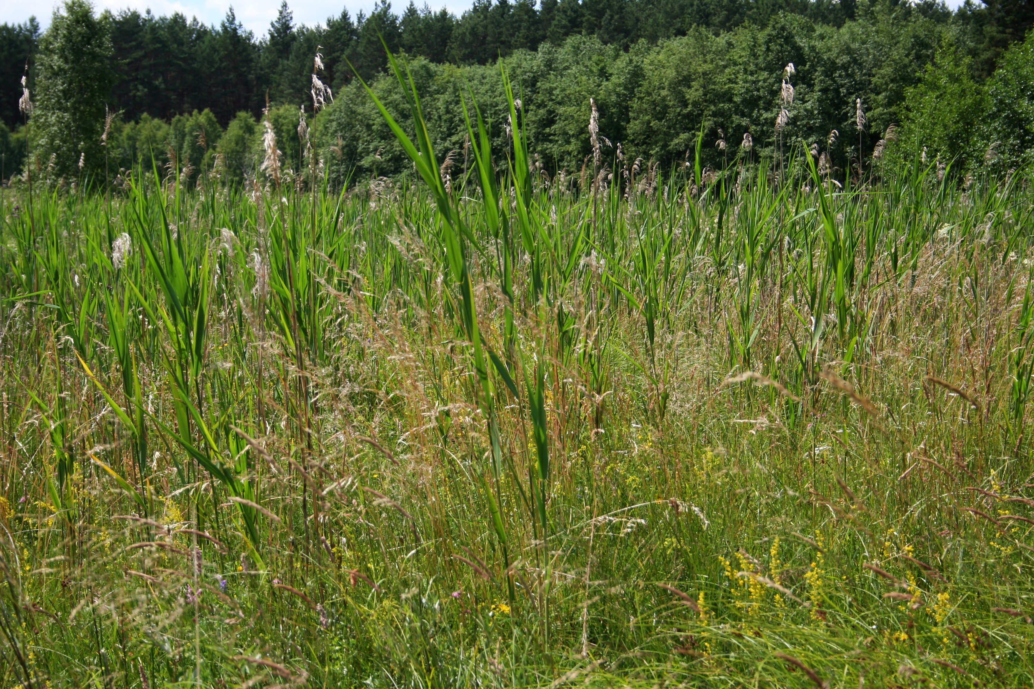 Zbiorowisko roślinne w rezerwacie Miedzno, Wdecki Park Krajobrazowy.